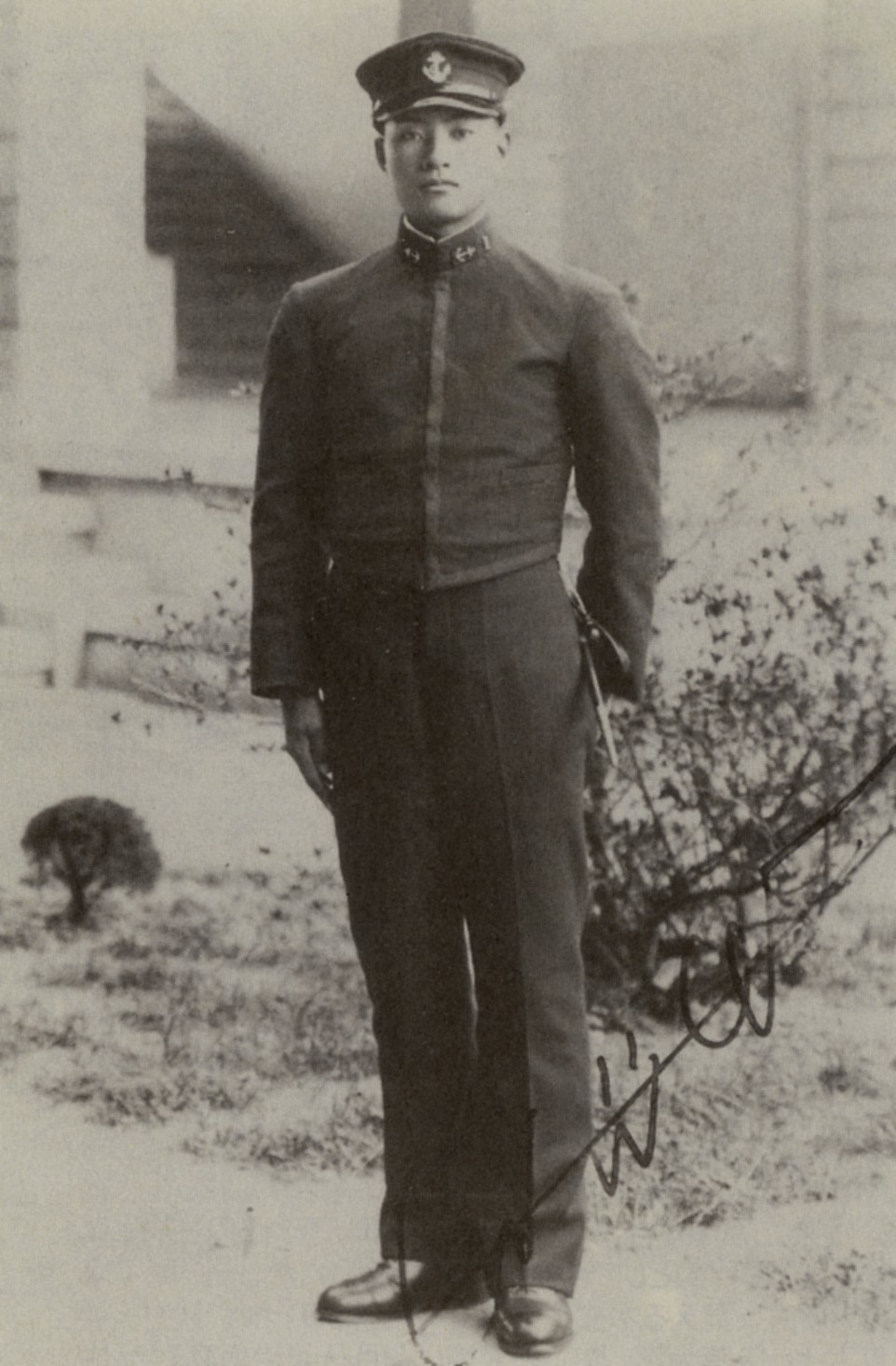 海軍兵学校4号生時代の関行夫